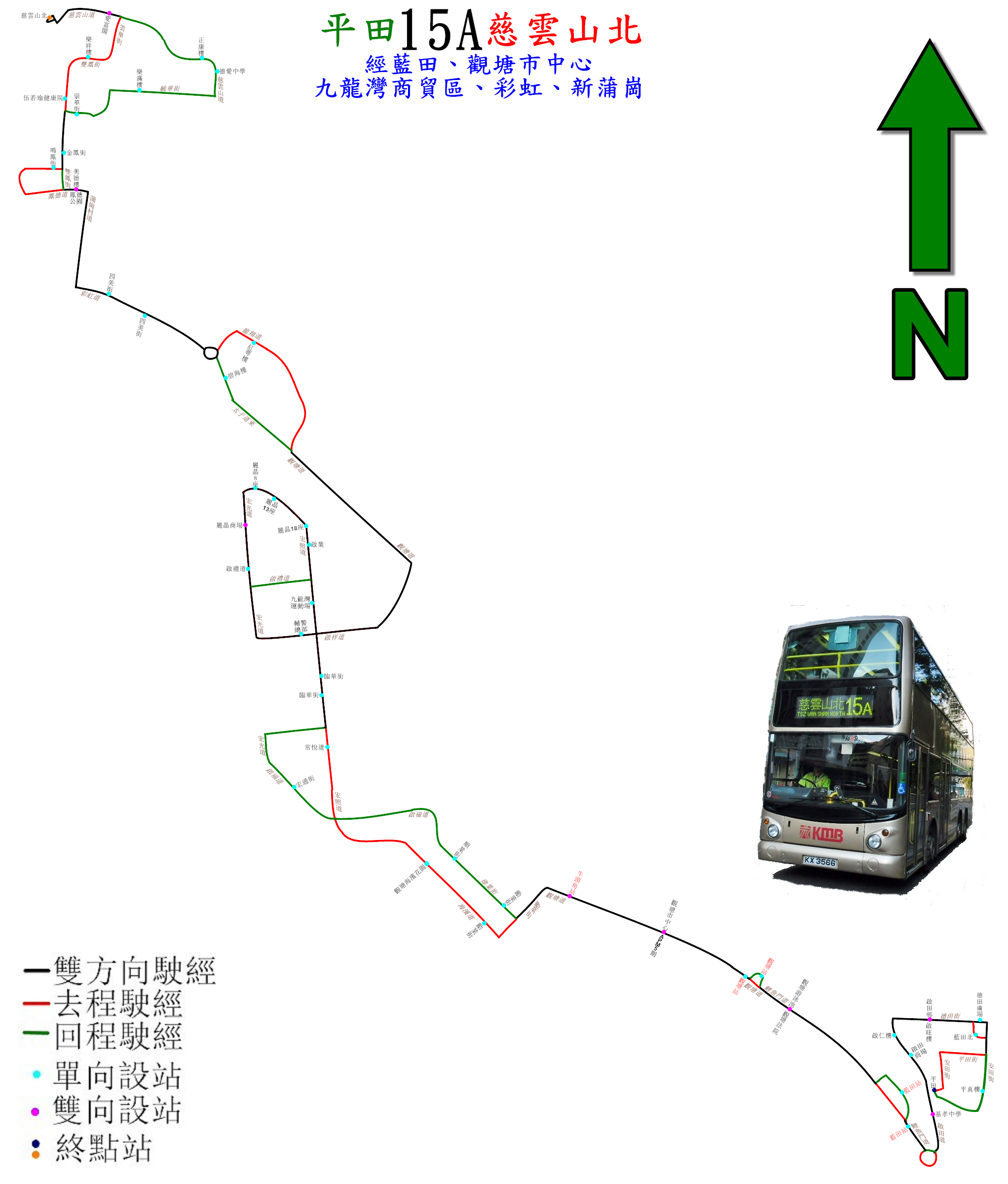 中文（香港）: 九巴15A線的走線圖